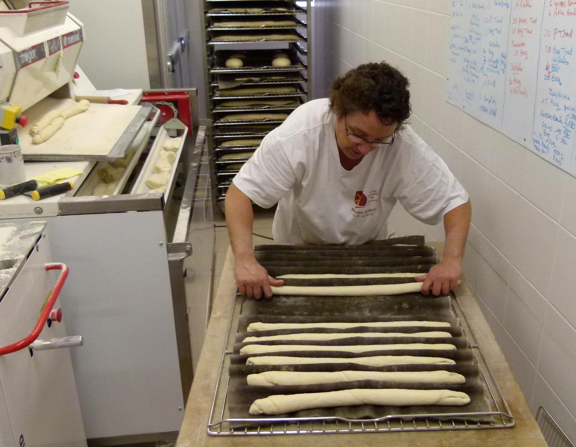 La boulangère dispose les pâtons sur une toile de lin, nommée la couche